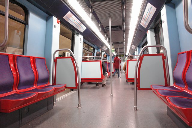 Photographer: Osvaldo Gago